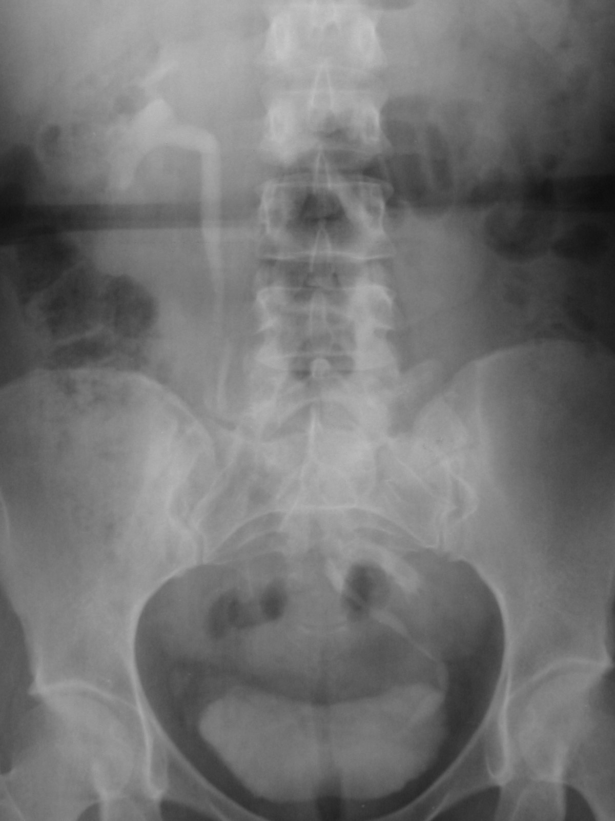 Rx analógica en otro urograma excretor, el RI pélvico muestra además rotación, longitud acorde del uréter. RD ocupa la fosa renal correspondiente